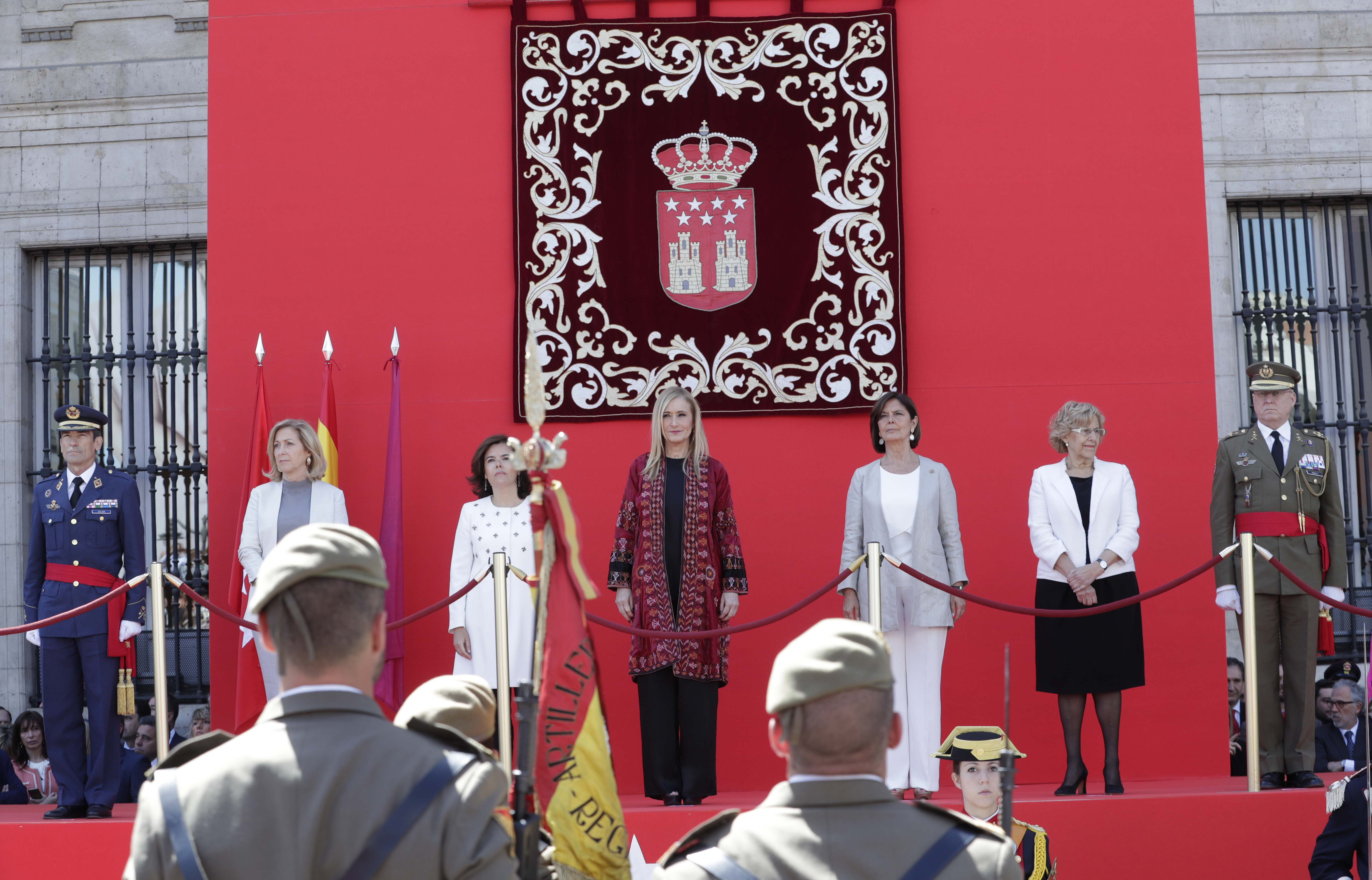 Parada militar que ha tenido lugar ante la Real Casa de Correos, con la que se ha rendido homenaje a todos los que dieron su vida por España. Durante el acto, se han colocado sendas coronas de laurel en las lápidas que recuerdan a los Héroes del 2 de mayo de 1808 y a las víctimas de los atentados del 11 de marzo de 2004, situadas en la fachada de la sede del Gobierno regional.